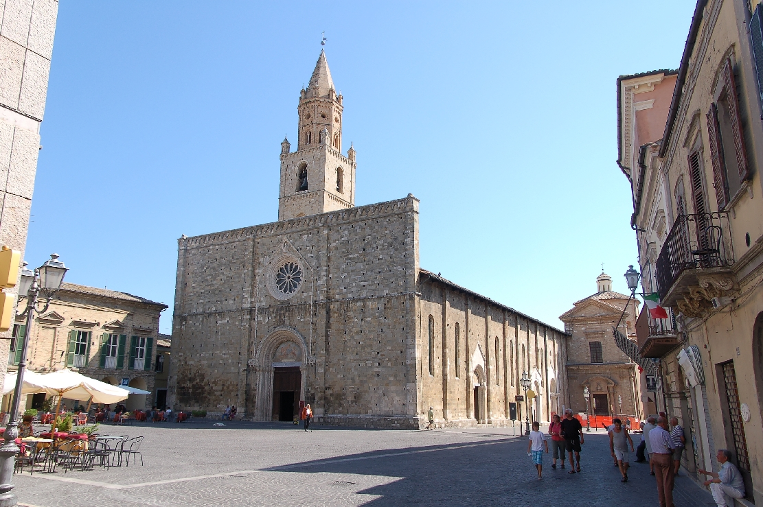 Atri 2011